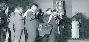 조선인민군 총참모장 강건의 영구를 메고 가는 김일성과 박헌영, 1950